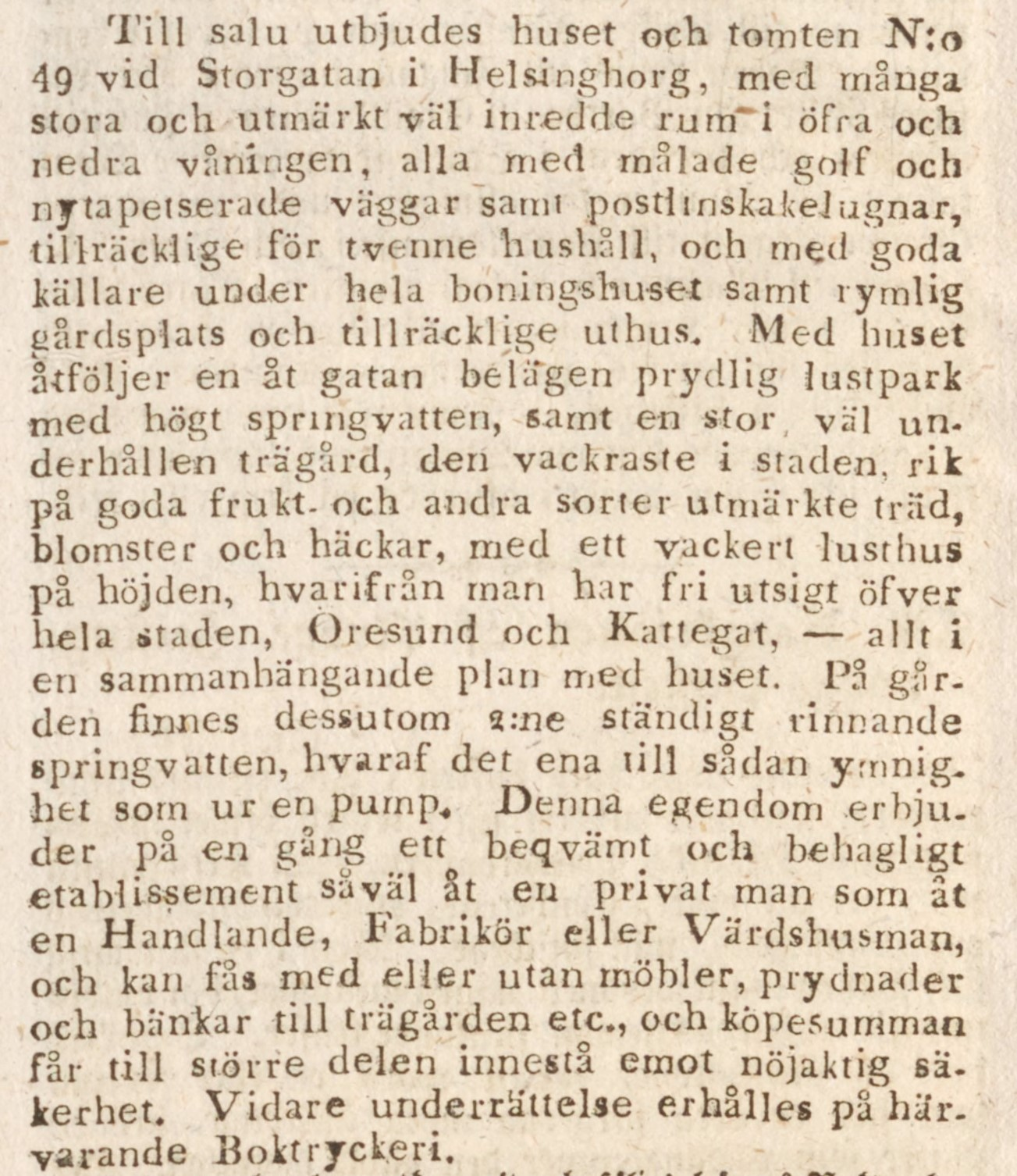 Annons i Helsingborgs-Posten den 26 mars 1831 om försäljning av Henckelska gården.